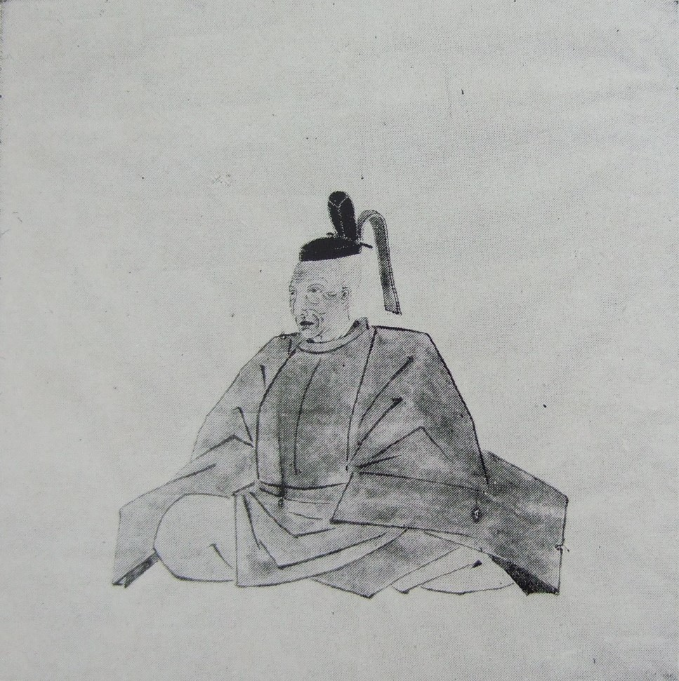 氷室長翁小照 （明治6年11月20日於大光院追善供養之節） 吉田貞画